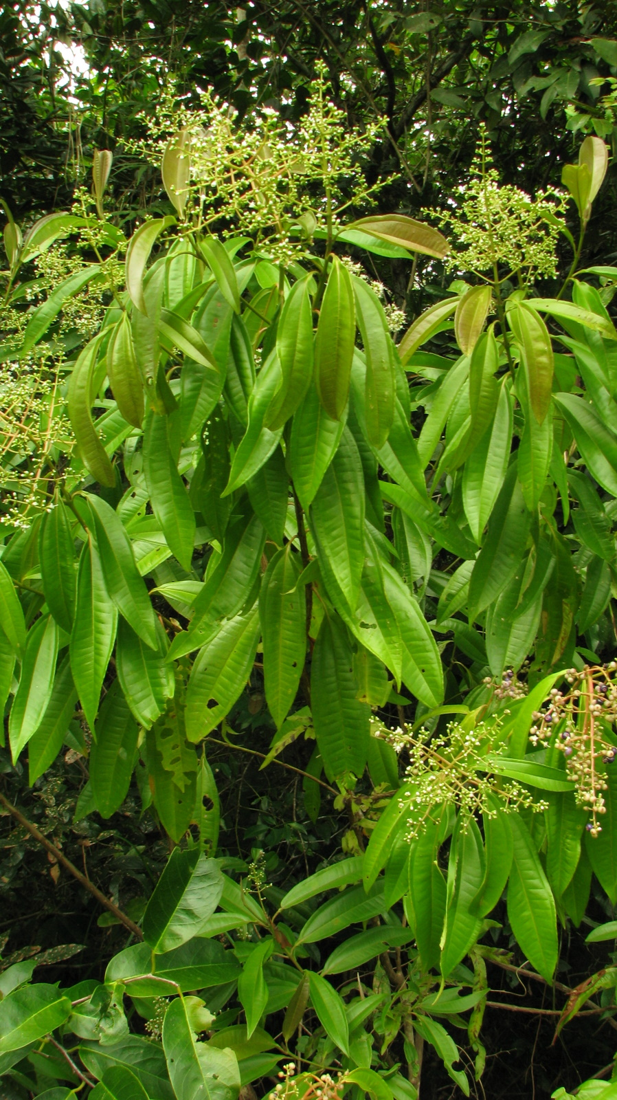 Miconia prasina (Sw.) DC.